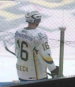 Kris Beech i HV71 under uppvärmningen inför den femte finalmatchen i SM-slutspelet 2009 i Karlstad mot Färjestads BK.